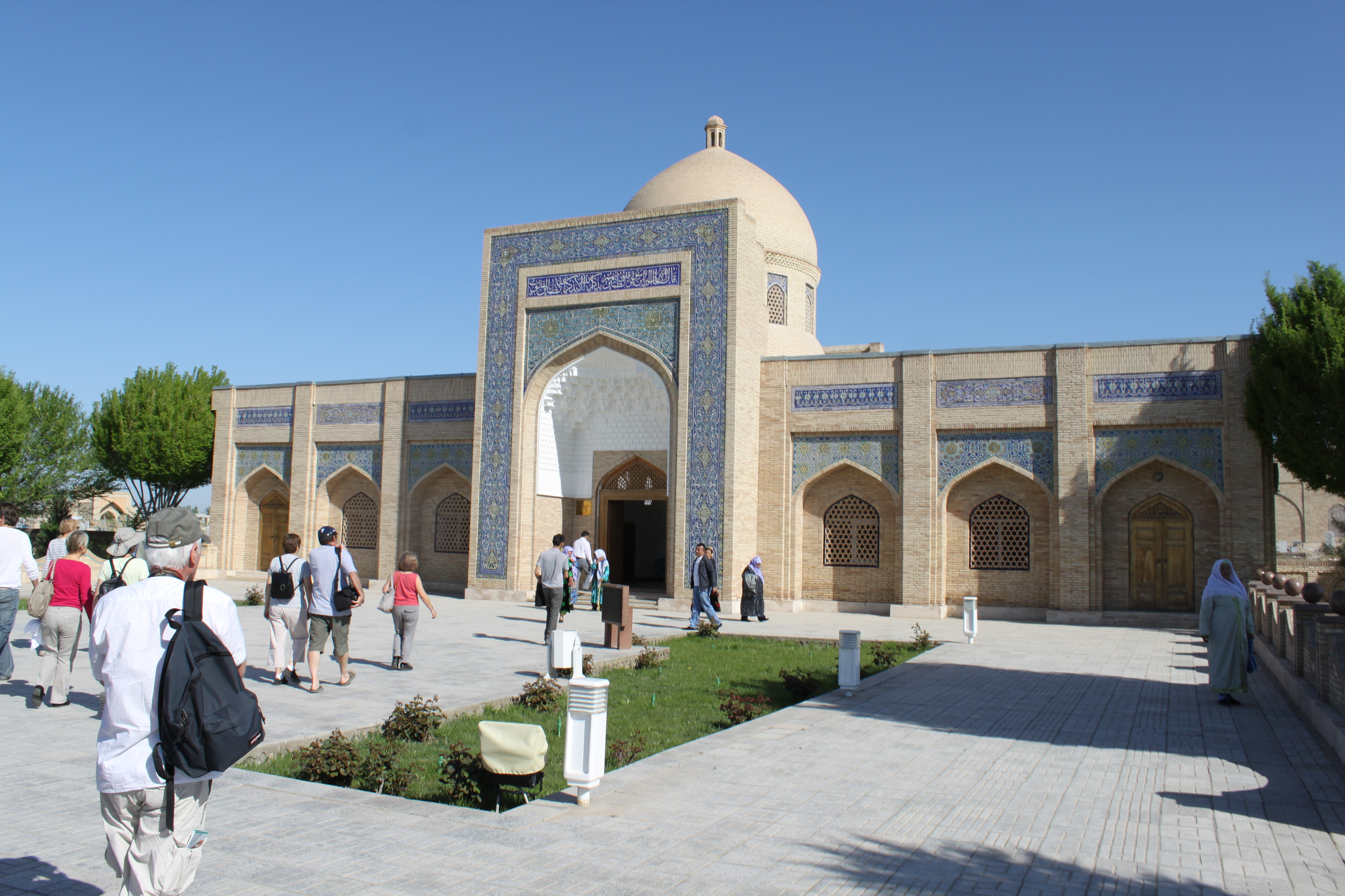 Entrée du mausolée Bahaouddin Naqshbandi